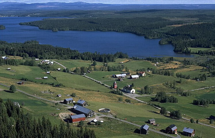 Skärvångens kapell i bildens mitt. Område med fångstgropar Motiv: Skärvången Nyckelord: Flygbilder, Riksintressen Kategori: Fångstgrop, Jordbruksby Skärvångens kapell i bildens mitt. Område med fångstgropar.